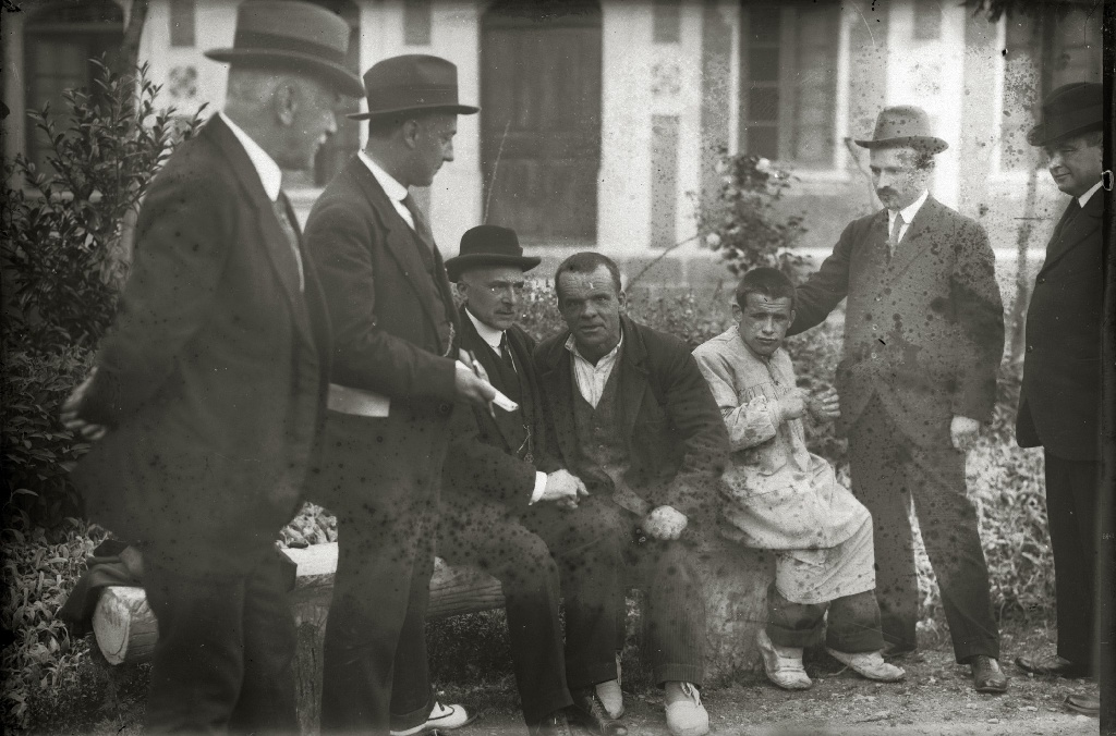 Título original: Psiquiatrico de Santa Águeda en Arrasate-Mondragón (2/3) Localización: Mondragón (Guipúzcoa)